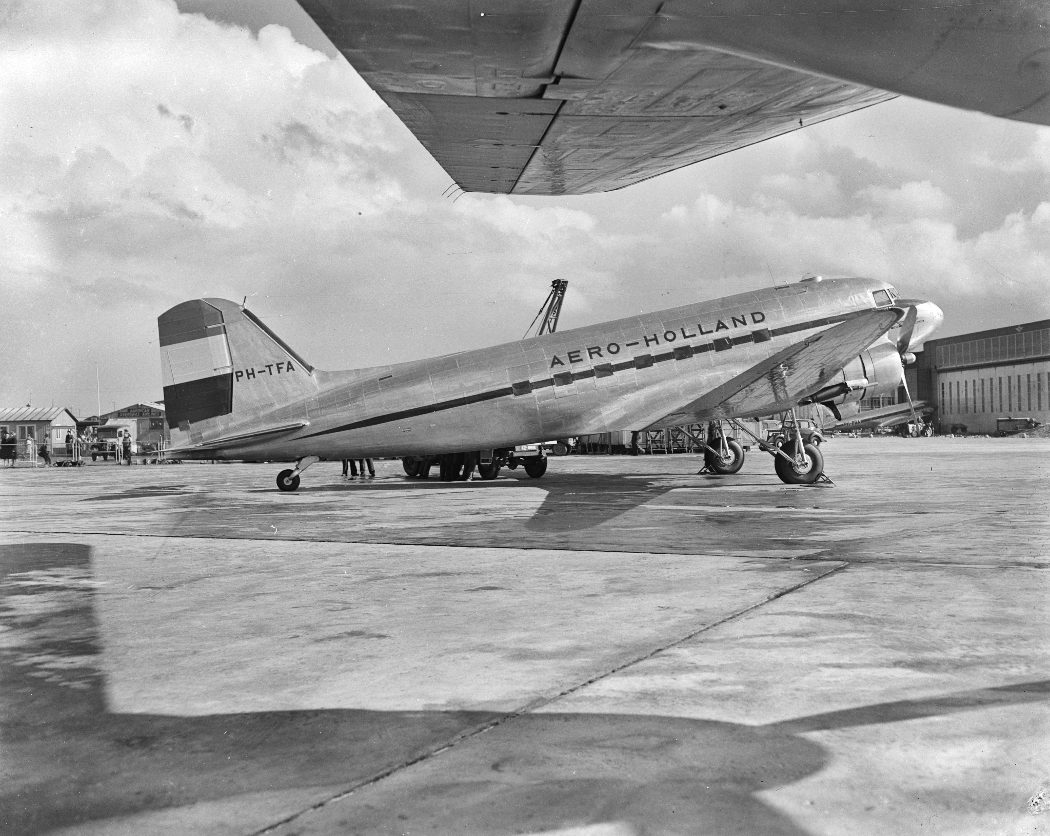 Collectie / Archief : Fotocollectie Anefo Reportage / Serie : [ onbekend ] Beschrijving : Dakota van de "Aero-Holland" Datum : 2 april 1948 Instellingsnaam : Dakota Fotograaf : Vrind, Luuk / Anefo Auteursrechthebbende : Nationaal Archief Materiaalsoort : Negatief (zwart/wit) Nummer archiefinventaris : bekijk toegang 2.24.01.04 Bestanddeelnummer : 902-6665